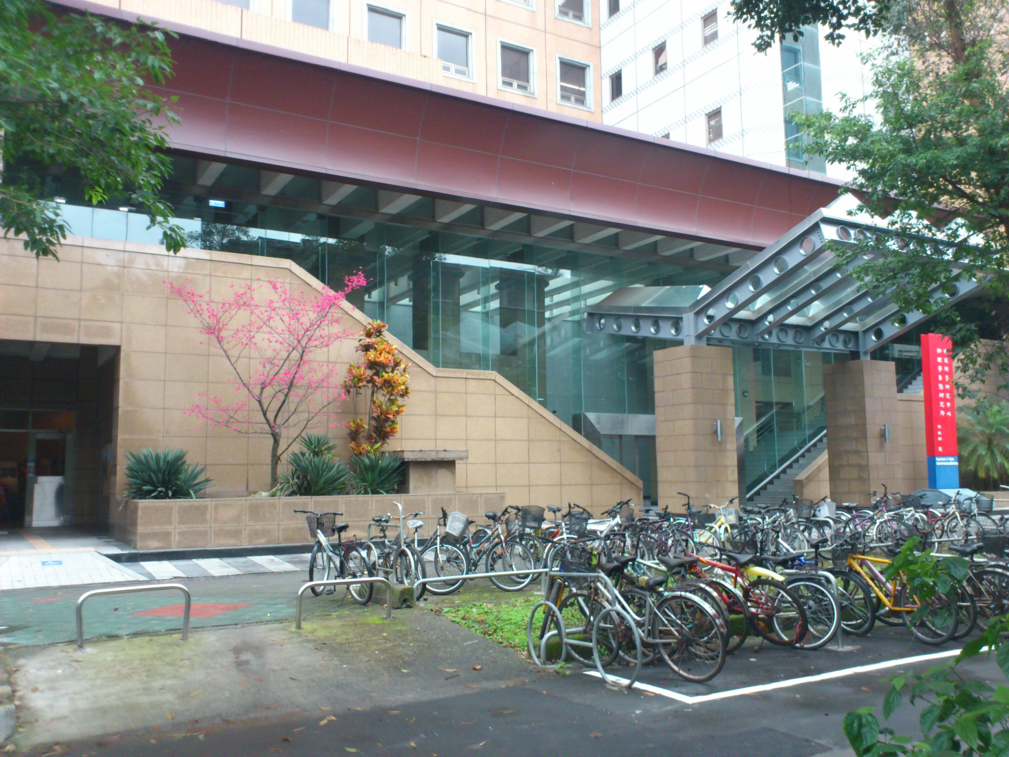 中文（台灣）: 凝態科學中心暨物理新館正面